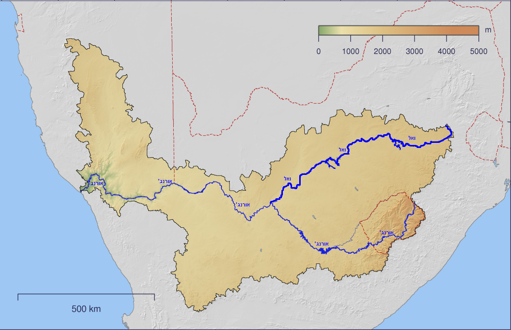 המסלול ואגן הניקוז של נהר אורנג' ושל יובלו העיקרי, נהר ואל. גבולות בינלאומיים מסומנים באדום מקור: File:Orange watershed topo.png